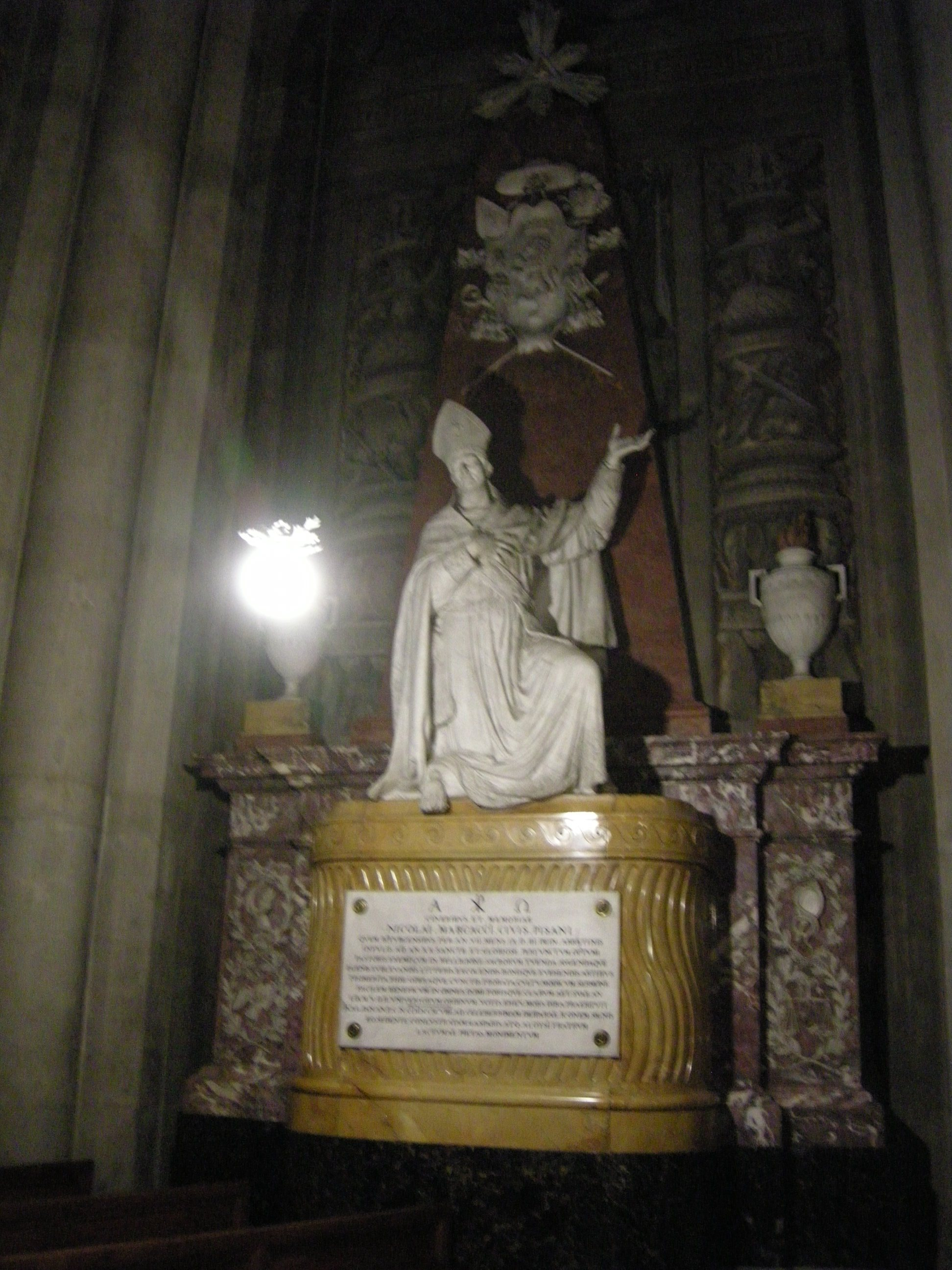 Duomo di arezzo, interno, cappella della madonna del conforto, tomba vescovo niccolò marcacci